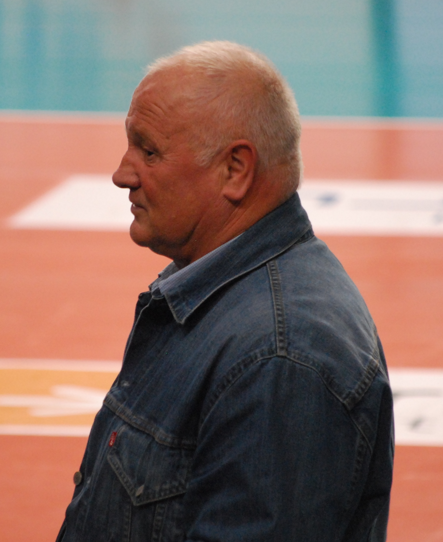 Jan Such